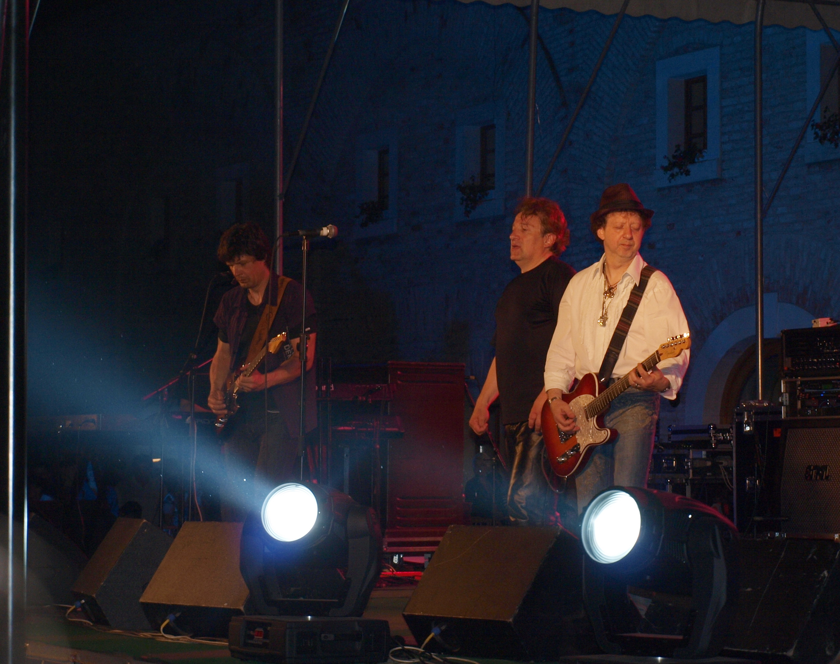 Prljavo kazalište 16. svibnja 2009. godine u Slavonskom Brodu.